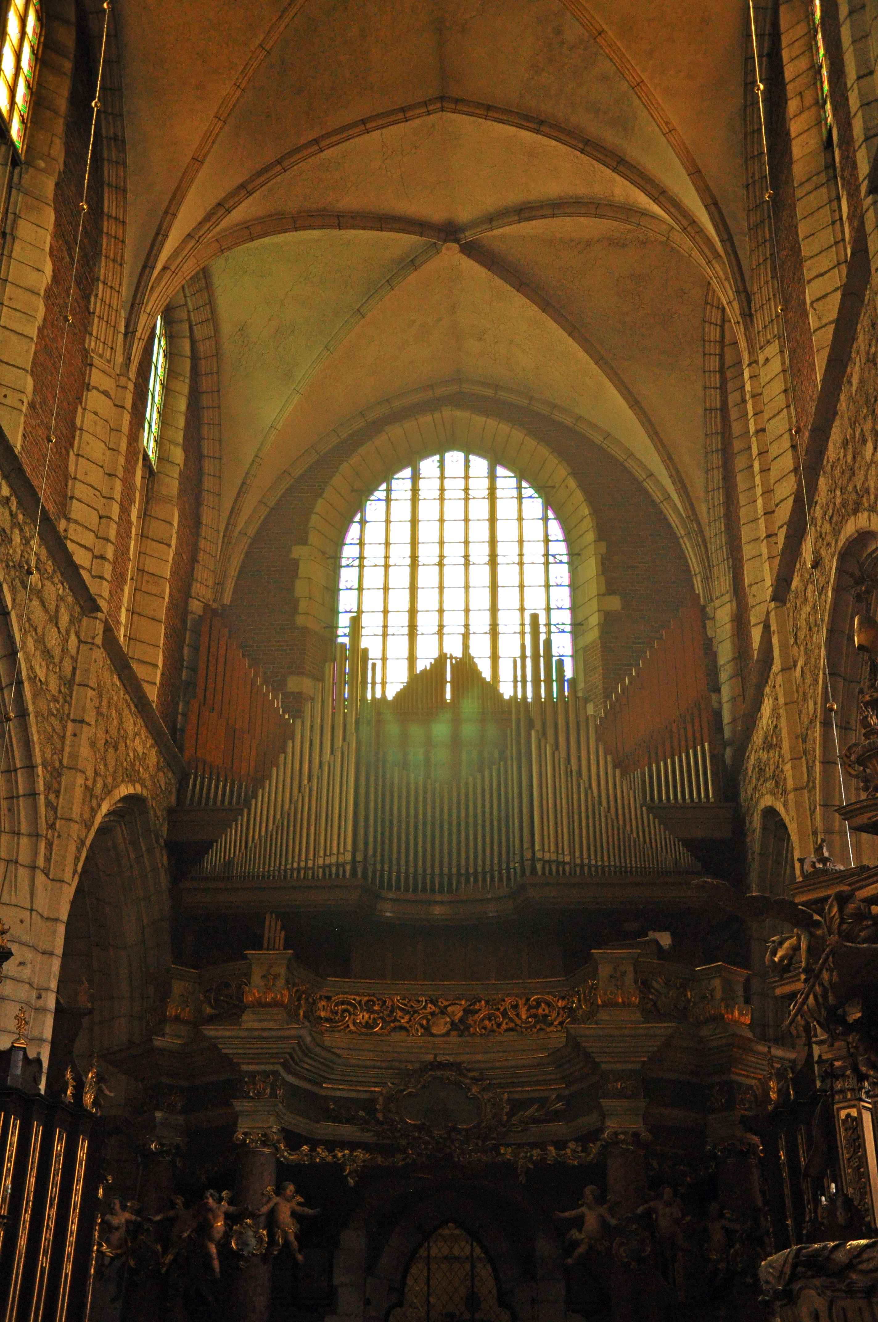 Bazylika Bożego Ciała w Krakowie